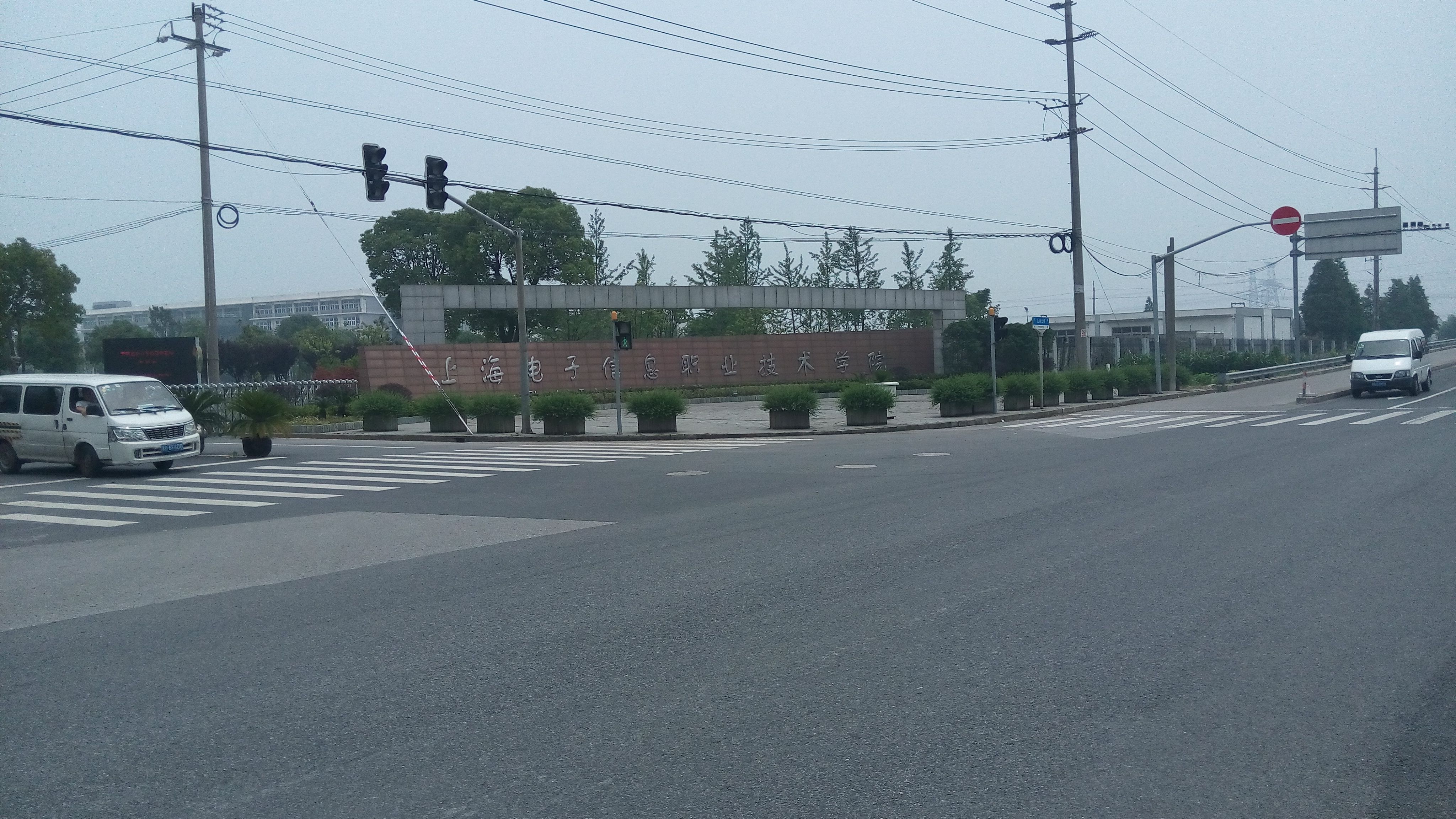 上海电子信息职业技术学院奉贤总校区大门